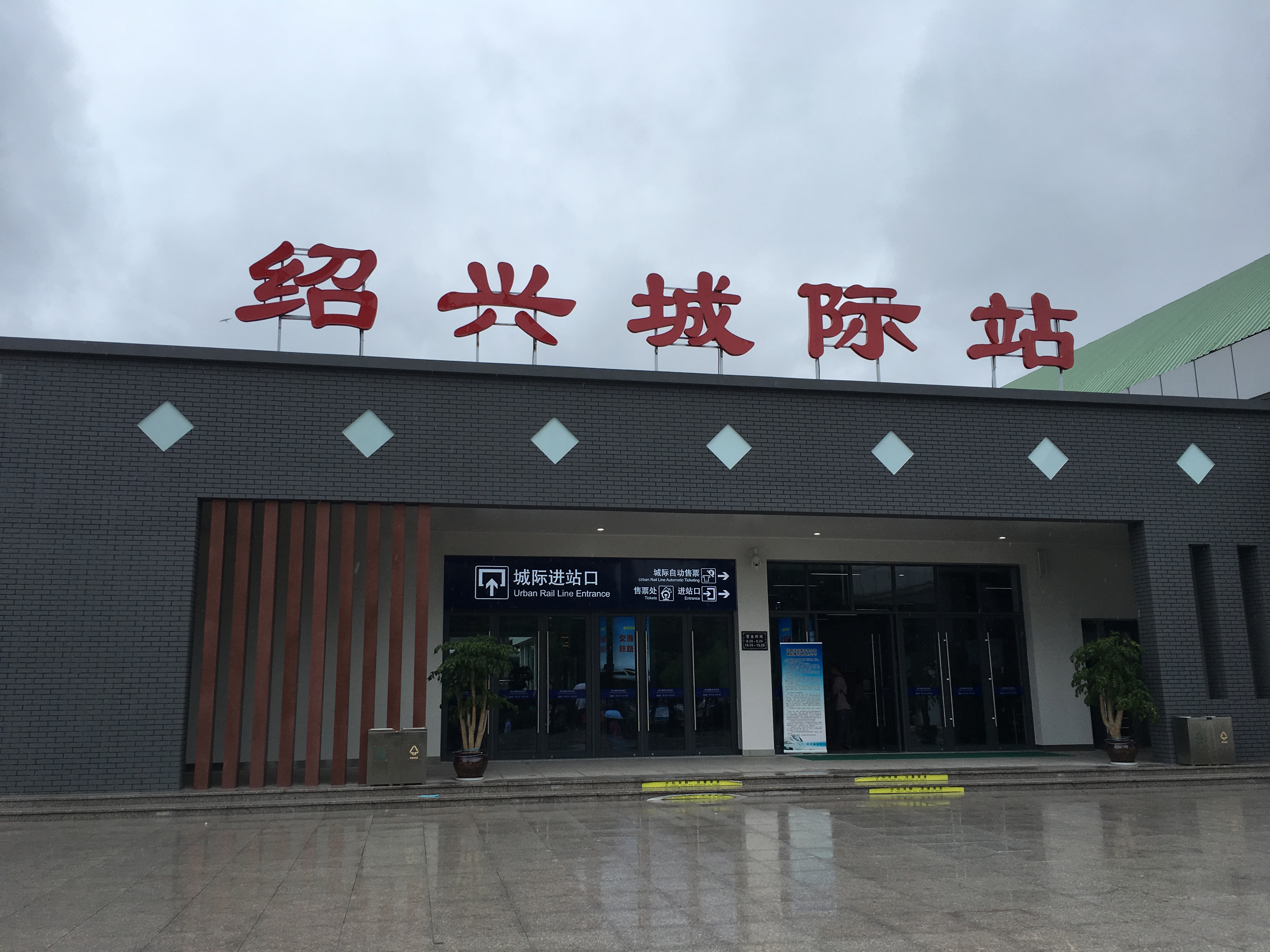 中文（中国大陆）: 绍兴站城际铁路入口